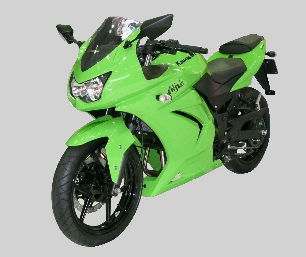 Kawasaki Ninja 250R (2007 Tokyo Motor Show)